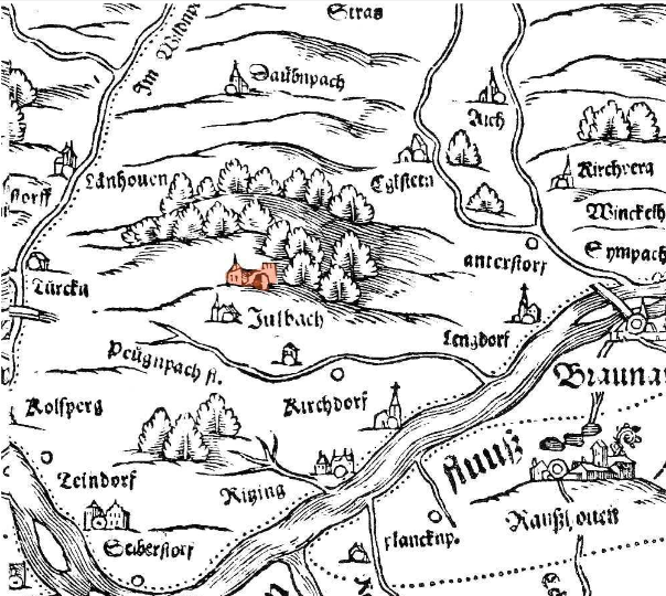 Landkarte von Bayern (Ausschnitt) von Philipp Apian